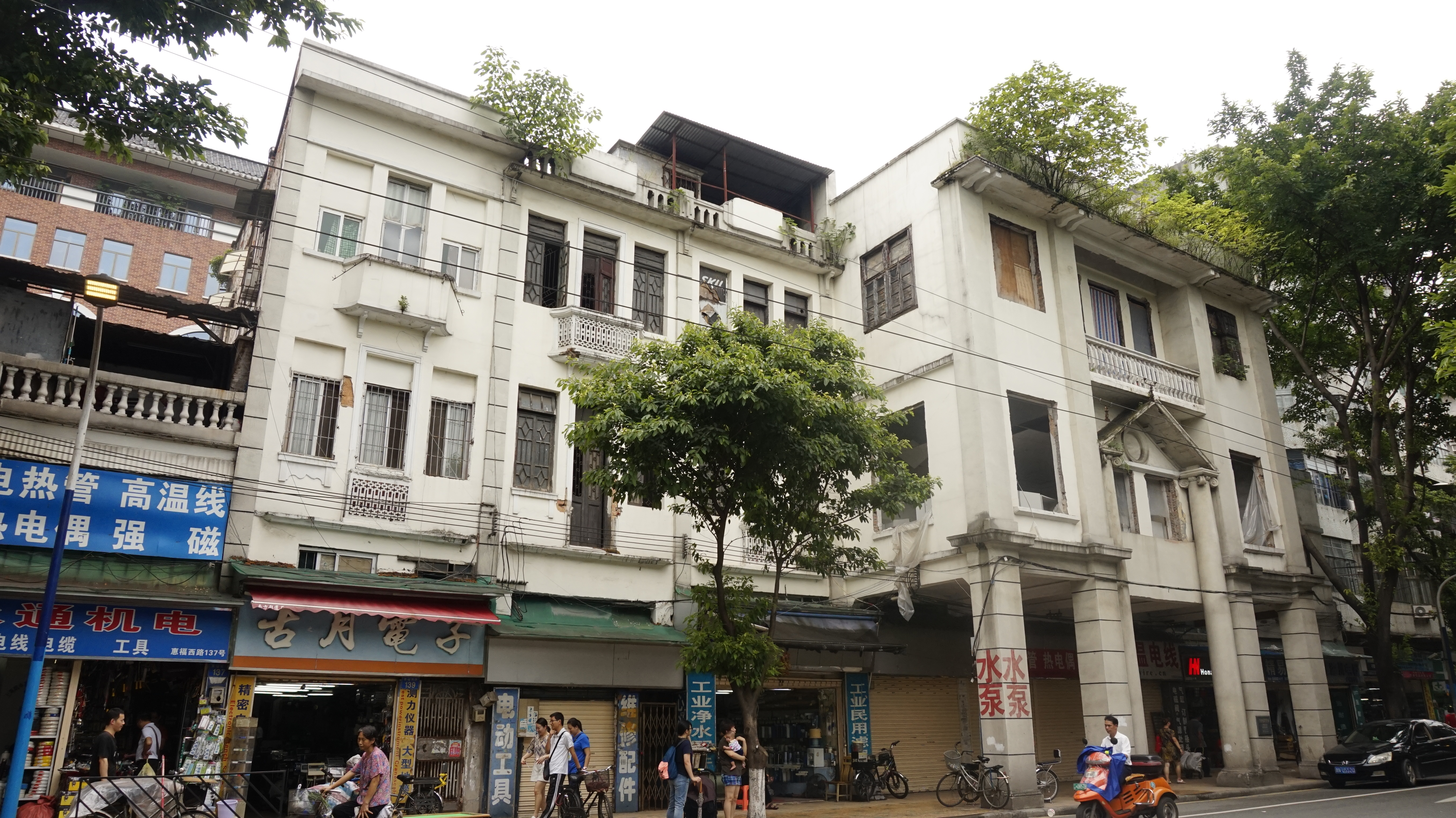 中文（中国大陆）: 位于广东省广州市越秀区惠福西路145号。